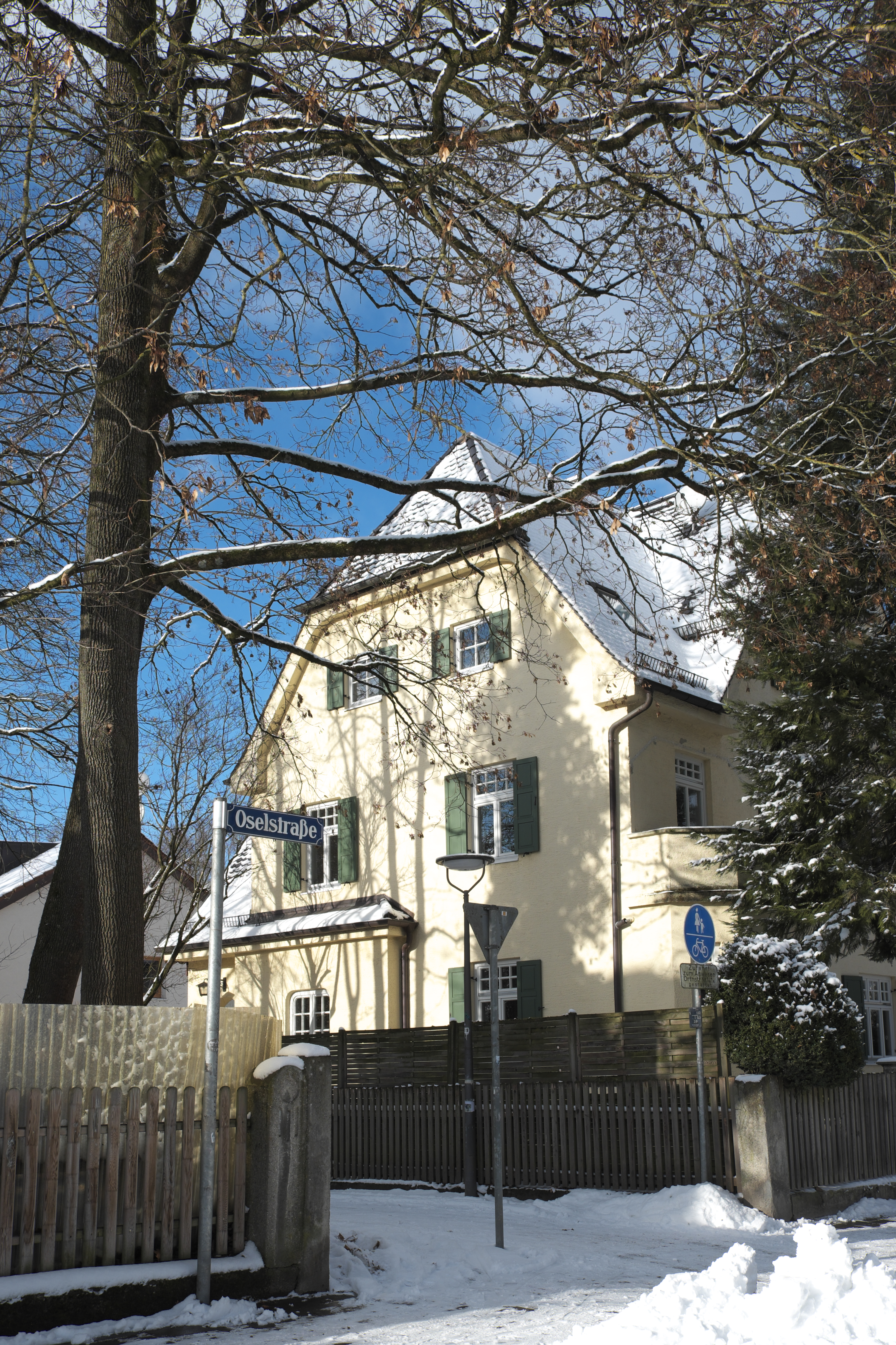 Villa in der Oselstraße 35 in Obermenzing im Stadtbezirk Pasing-Obermenzing in München (Bayern/Deutschland), 1911/12 von Georg Völkl erbaut